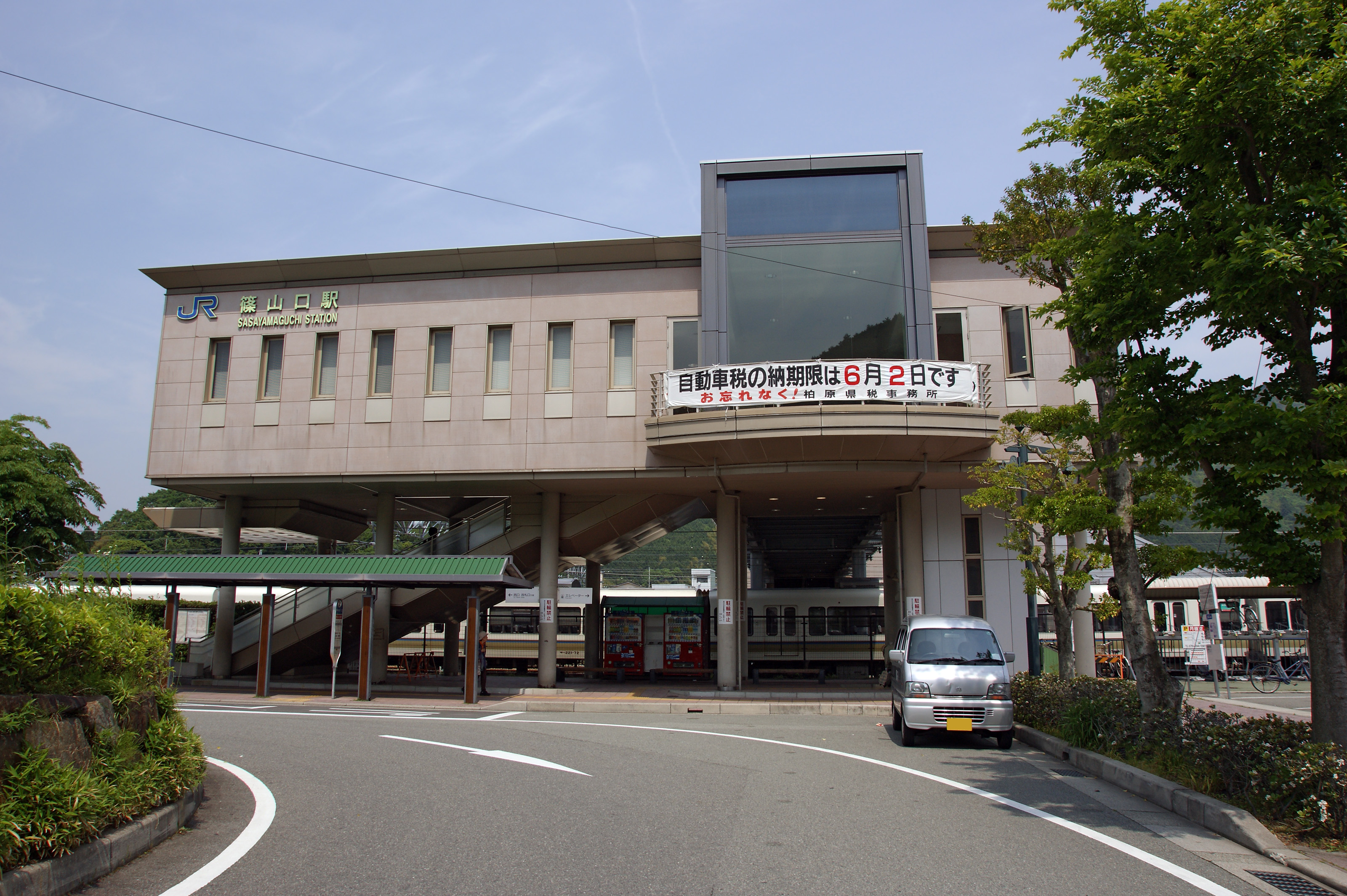 Sasayamaguchi Station in Sasayama, Hyogo prefecture, Japan